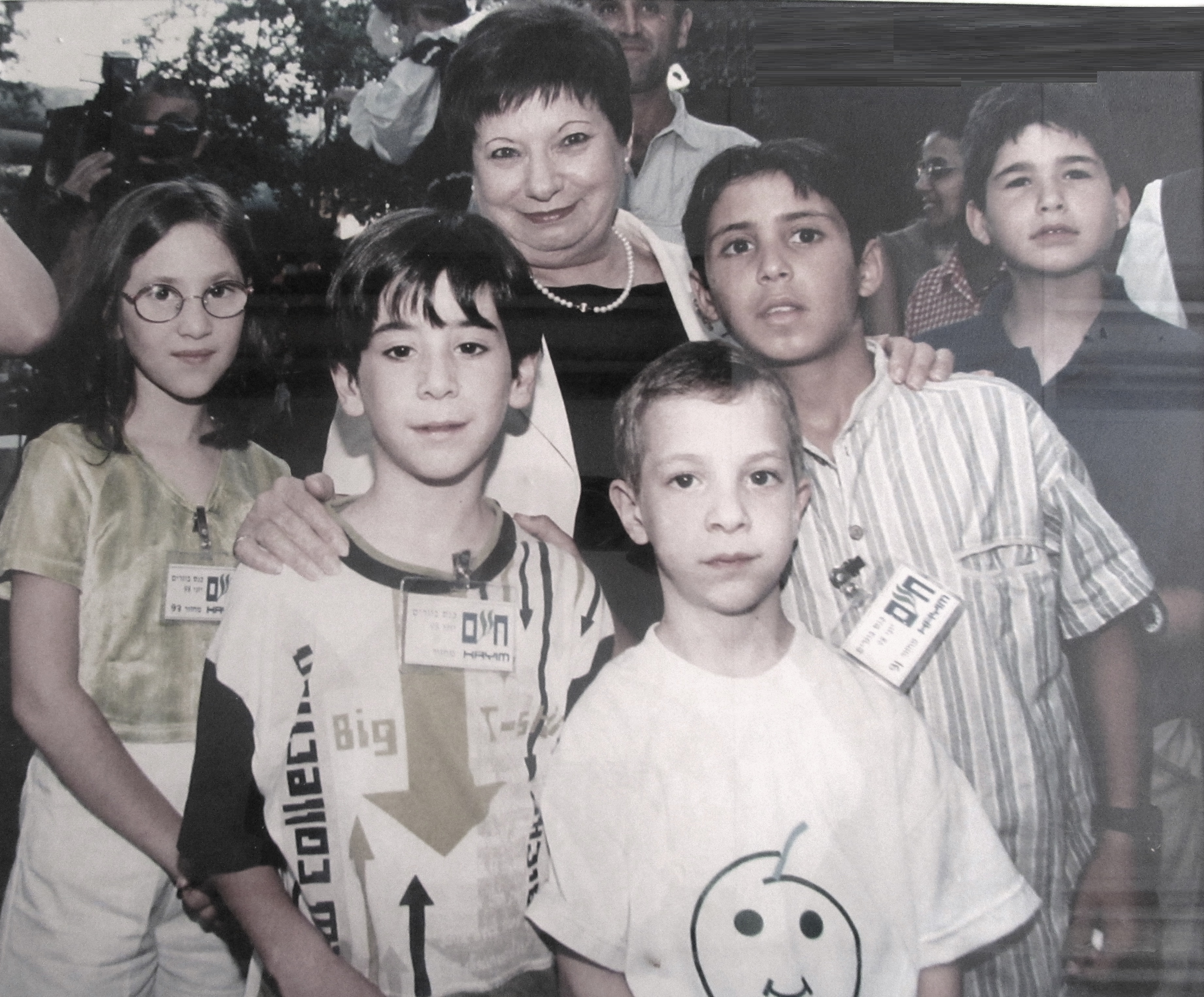 פרופ' רנה זייצוב עם ילדי עמותת חיים בכנס בוגרים, יוני 1993